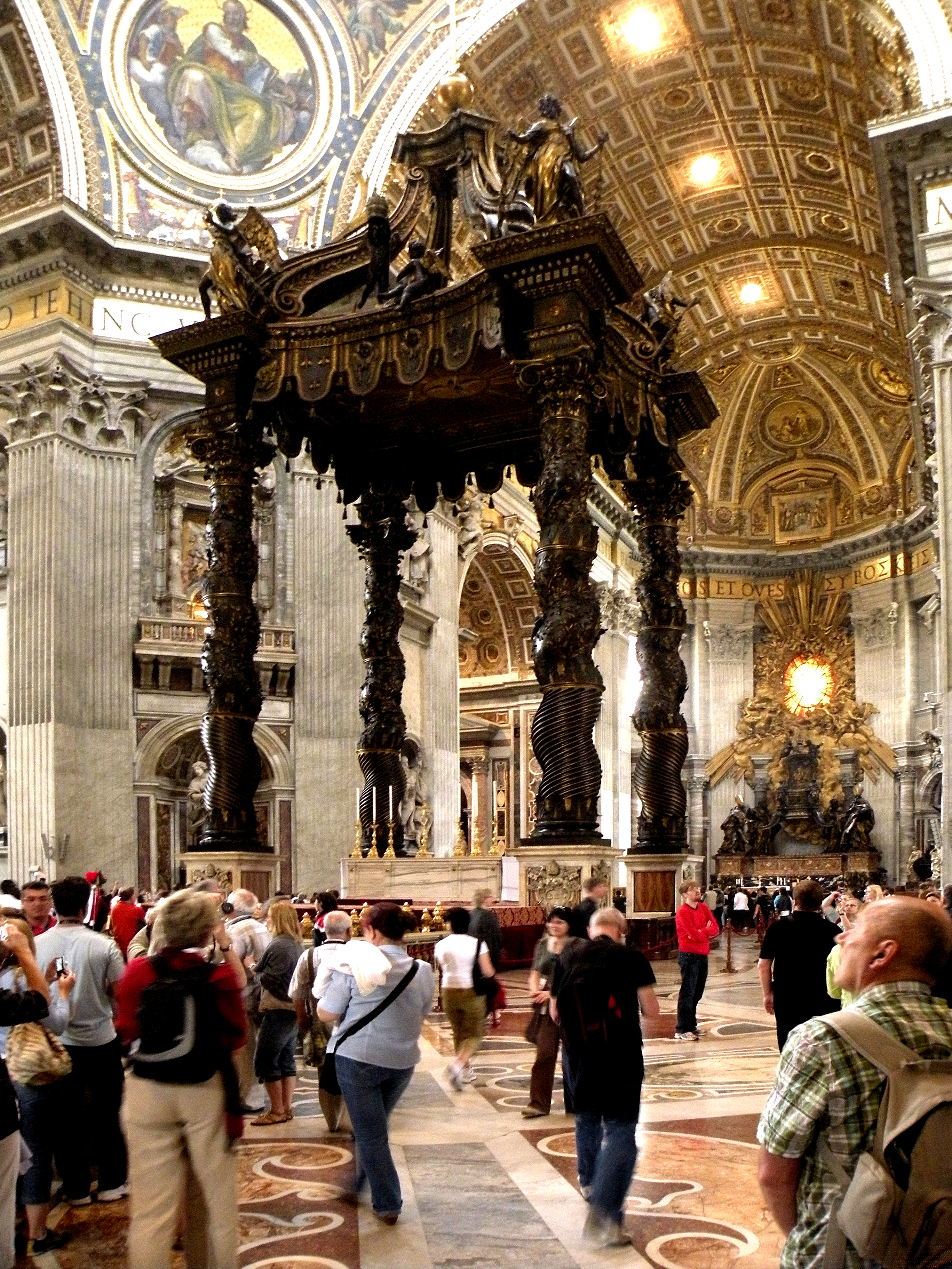 Сень над папским алтарём и могилой Св.Петра